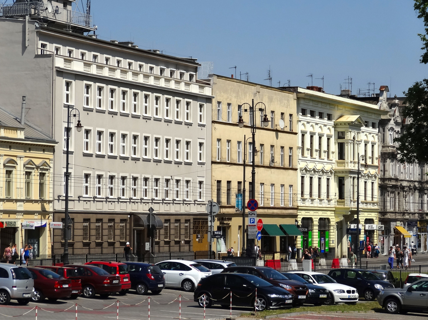 Ulica Ferdynanda Focha w Bydgoszczy